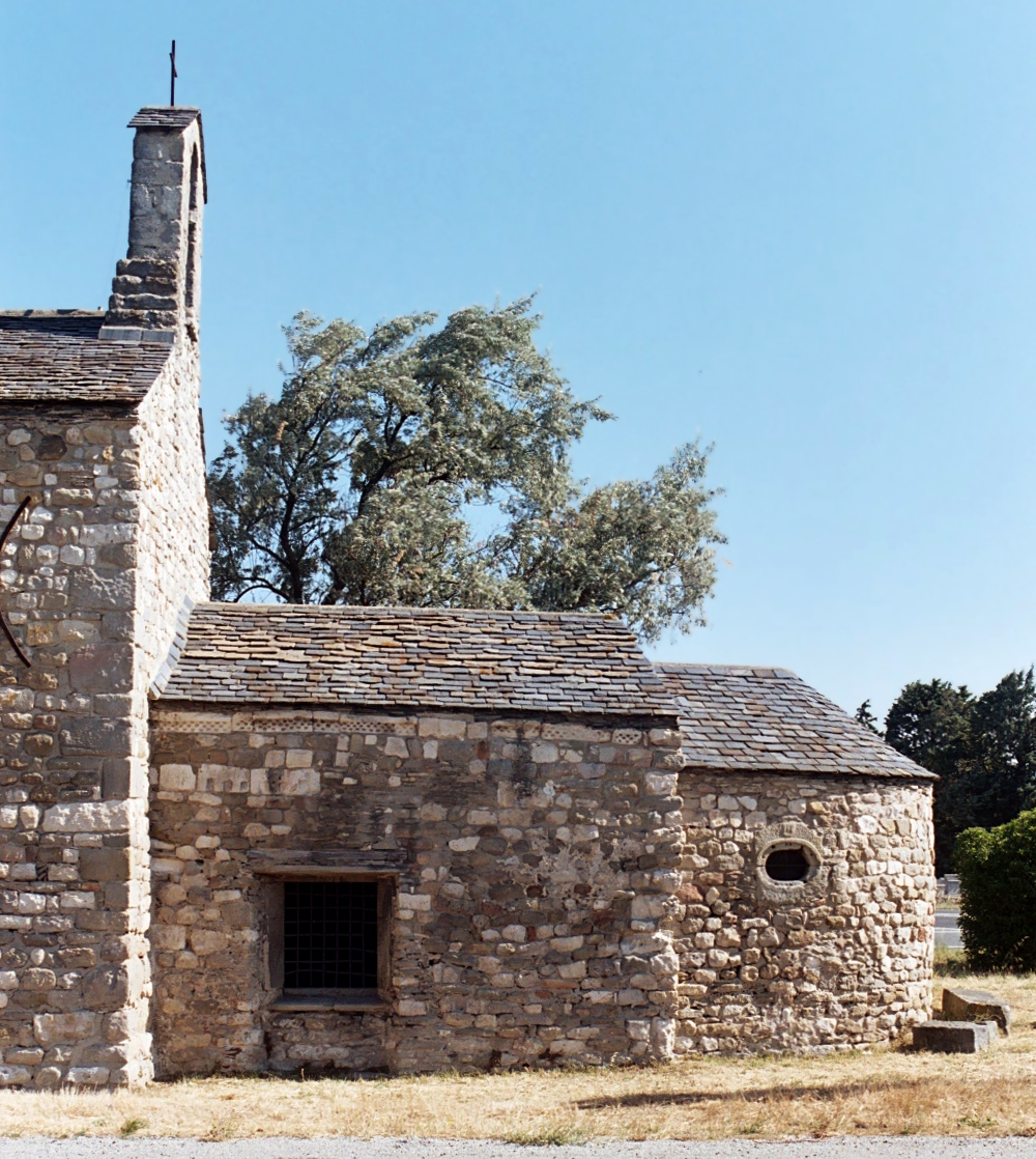 France - Languedoc - Aude - Chapelle de la Madeleine (Pezens)